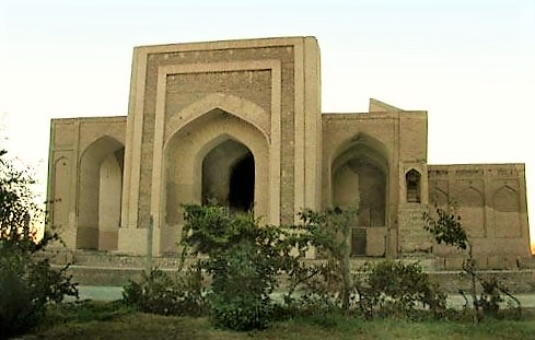 Мечеть Намазгох в Бухаре